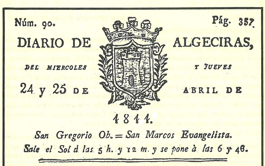 Fragmento de la portada del Diario de Algeciras del 24 y 25 de abril de 1811. Este diario fue la primera publicación del Campo de Gibraltar y además el escudo de la ciudad que aparece en la portada es la primera representación del blasón que se conoce.